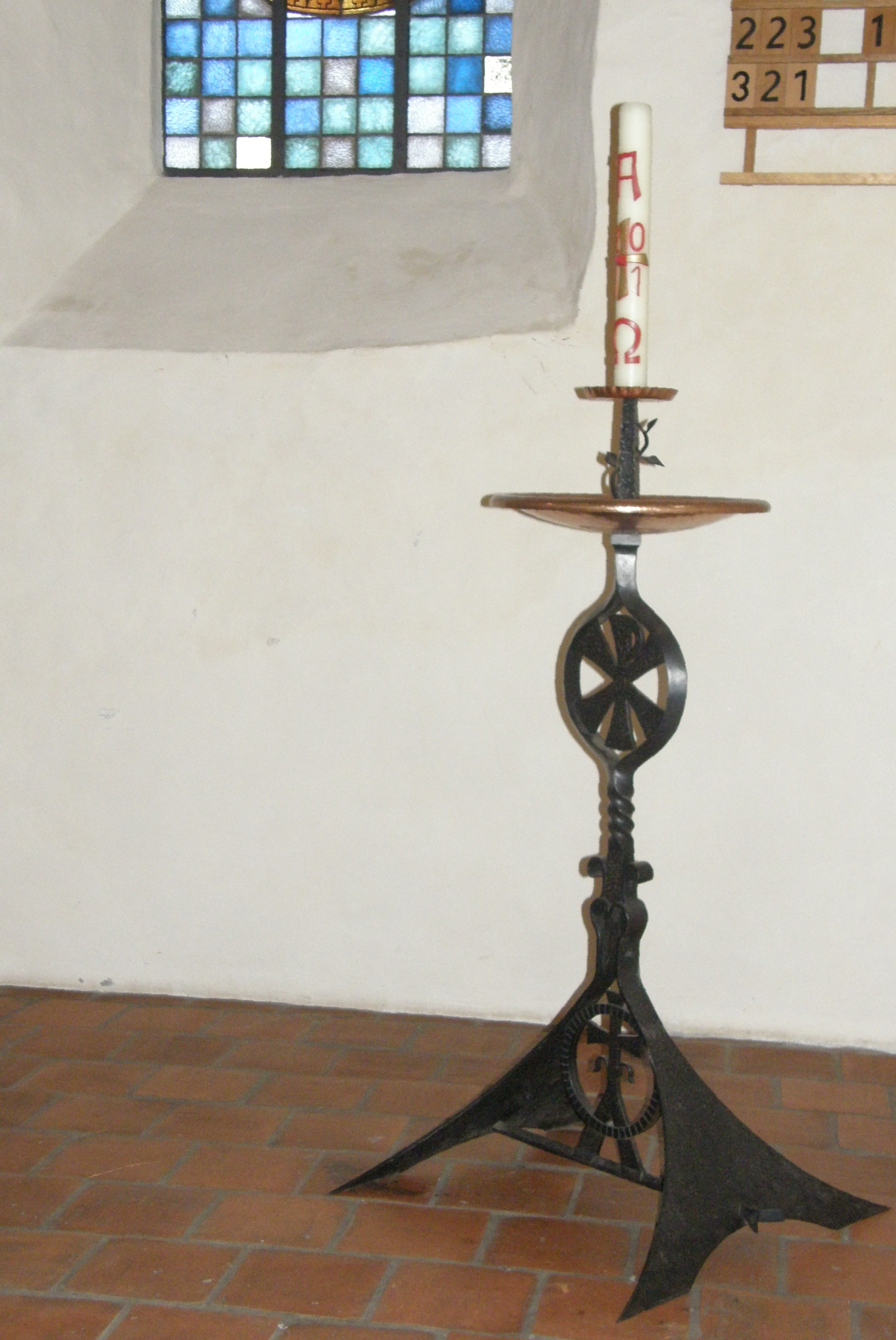 Falkenhagener Dorfkirche, Leuchter (2)